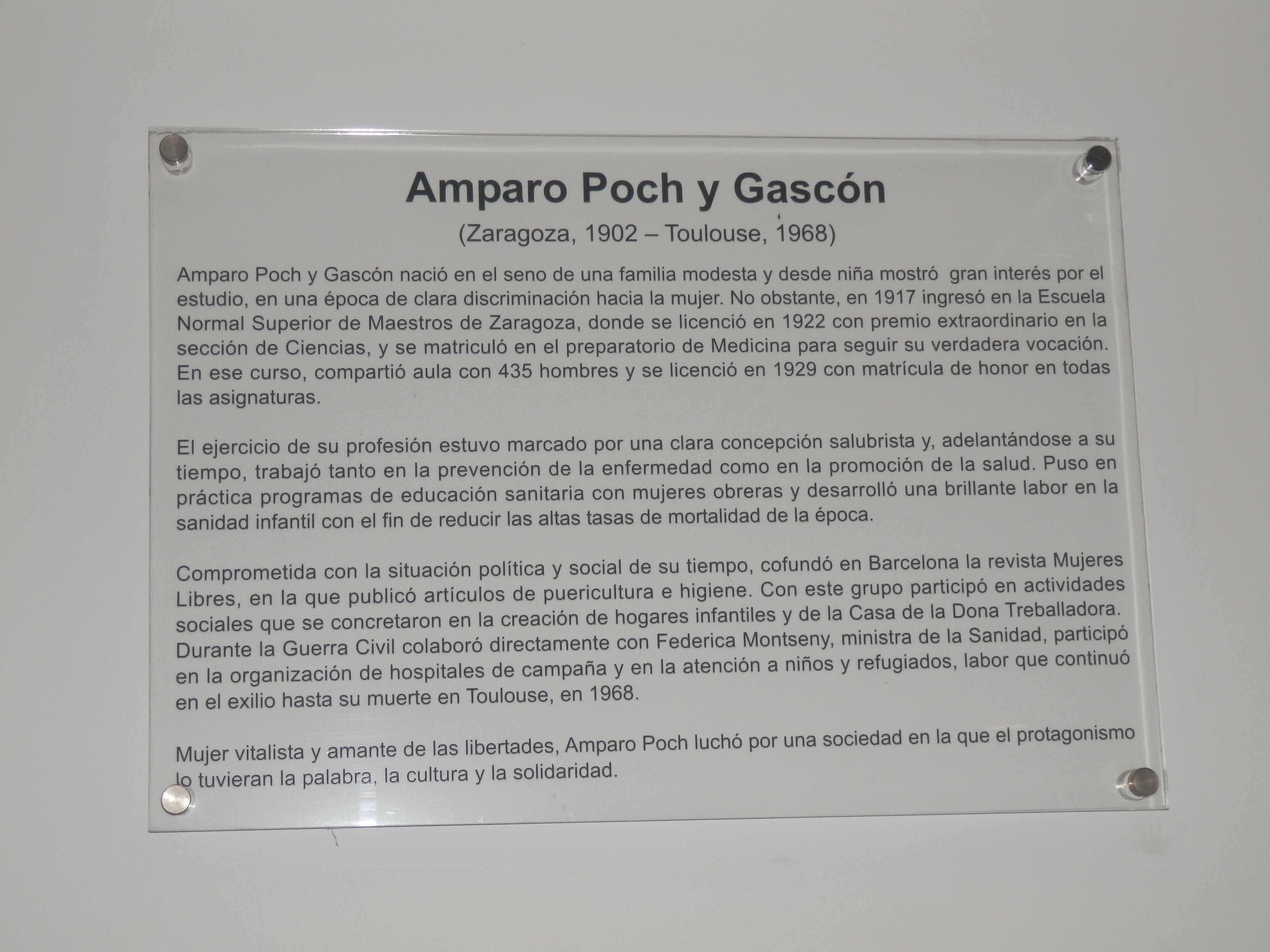 Centro de Salud Amparo Poch en la calle Emilia Pardo Bazán de Zaragoza. Placa con una breve biografía de Amparo Poch.